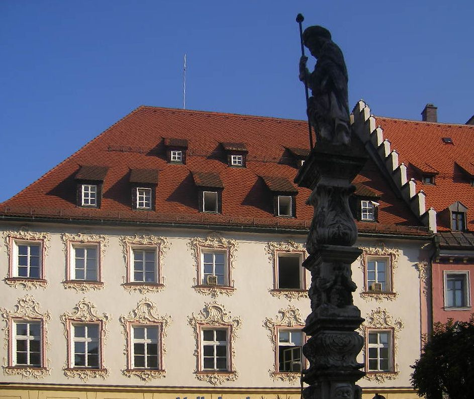 Straubing, Ludwigsplatz 21